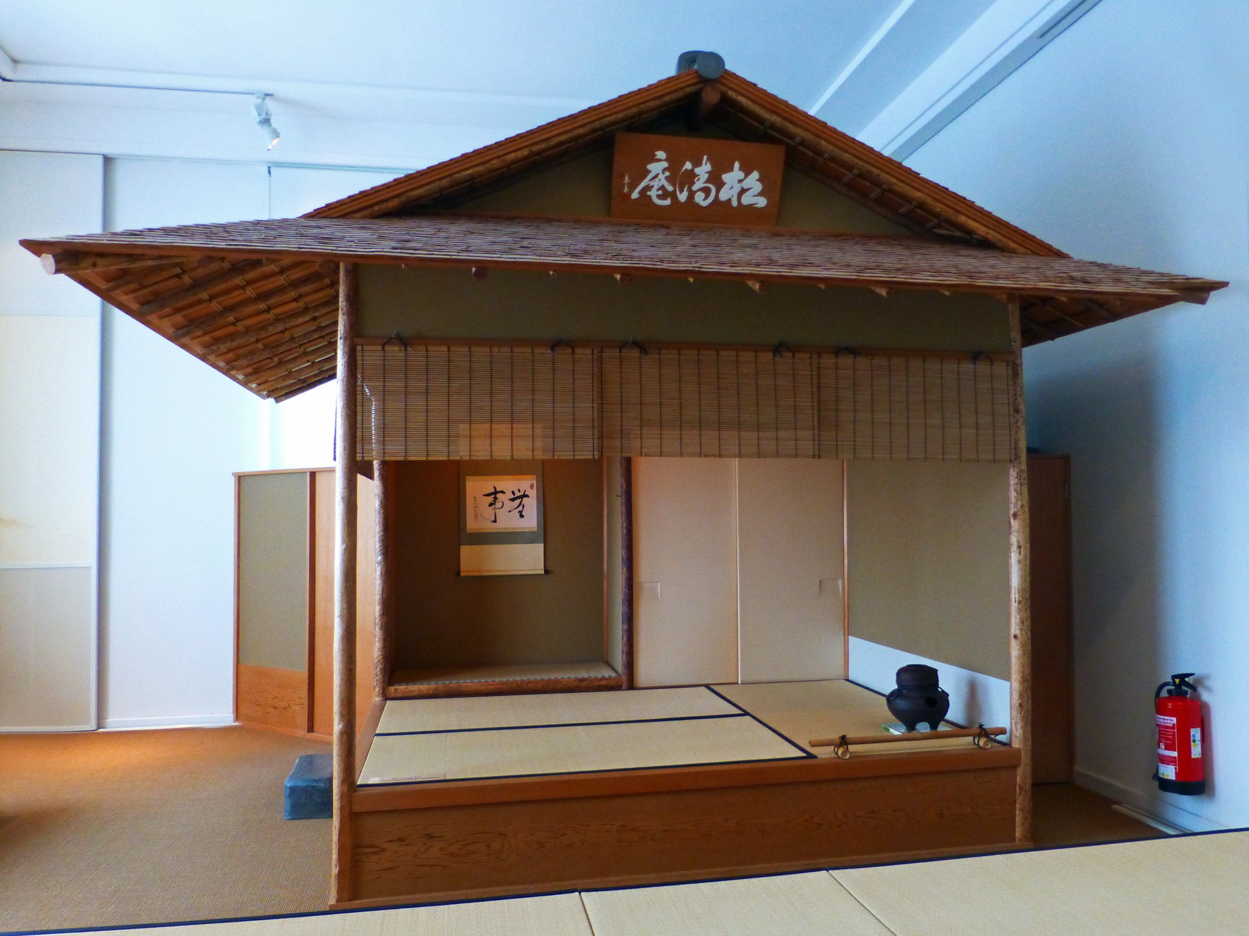 Japanisches Teehaus Shoseian, Museum für Kunst und Gewerbe Hamburg